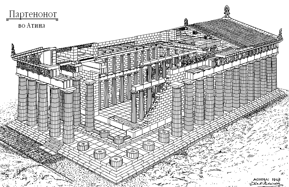 帕德嫩神廟截圖